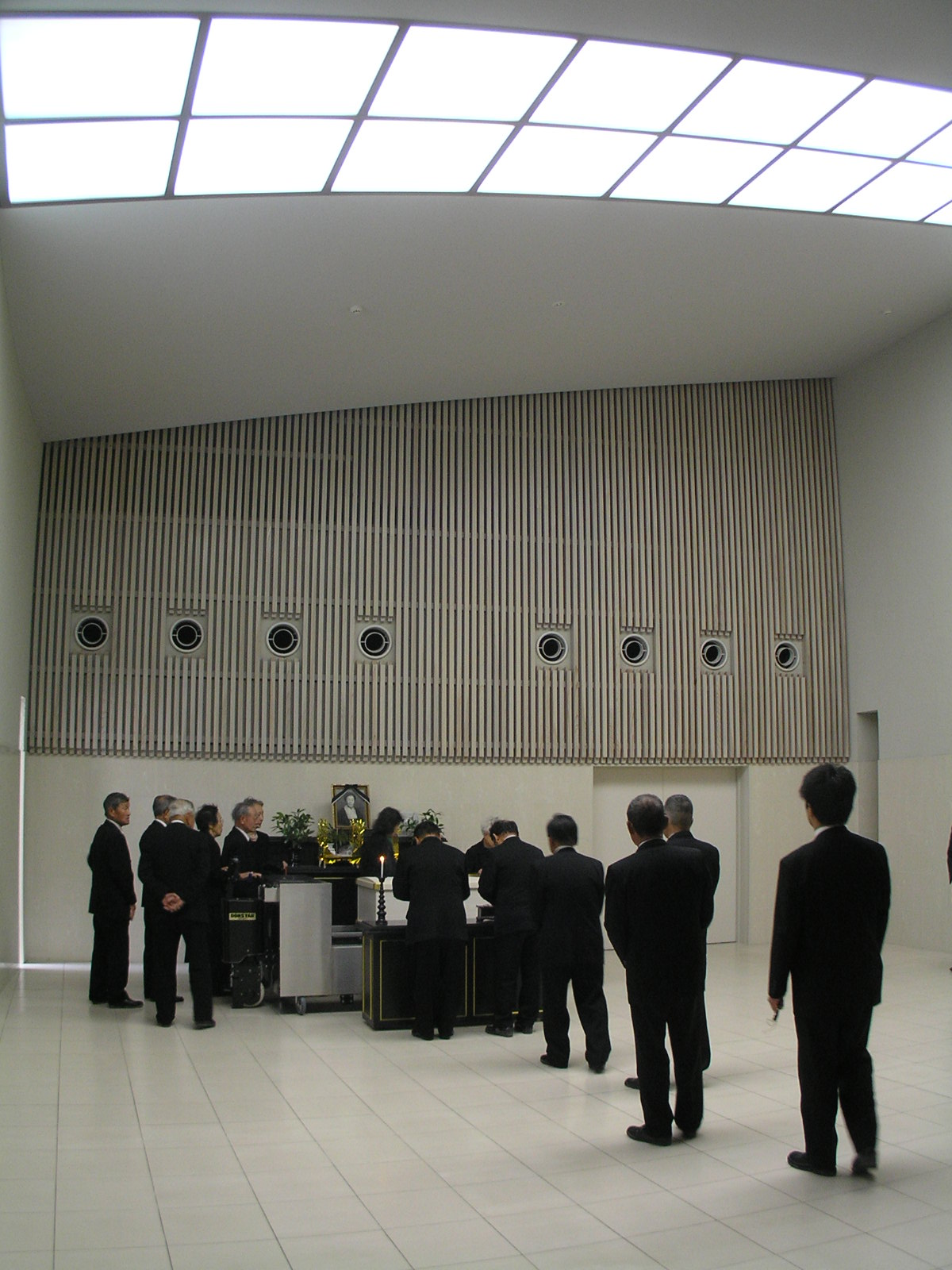 炉前告別ホール 土居斎苑(四国中央市） ～photo by Autumn Snake 【おぉたむ すねィく探検隊】